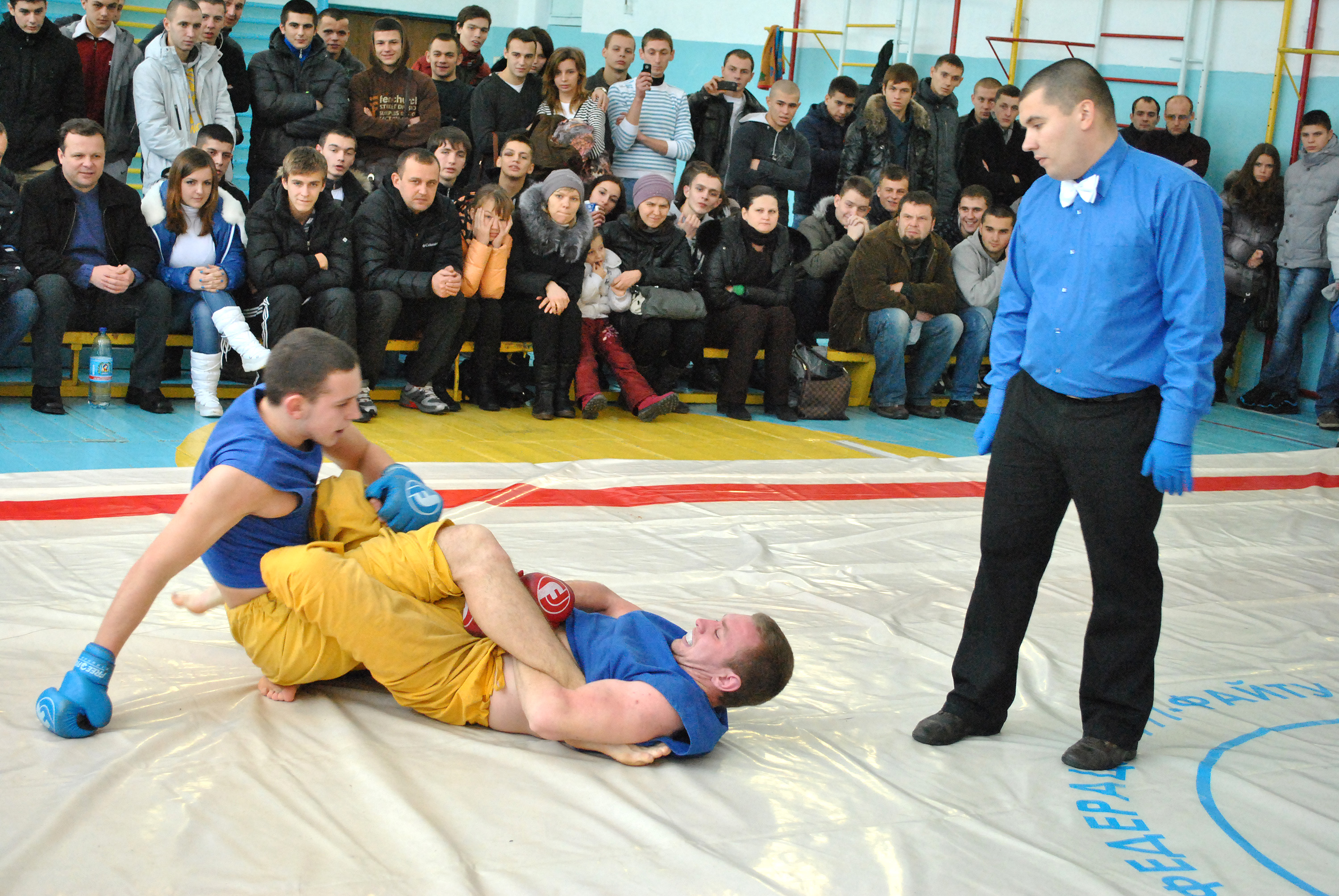 Змагання із фрі-файту в Тернополі у грудні 2012 року, спортивний клуб «Характерник».